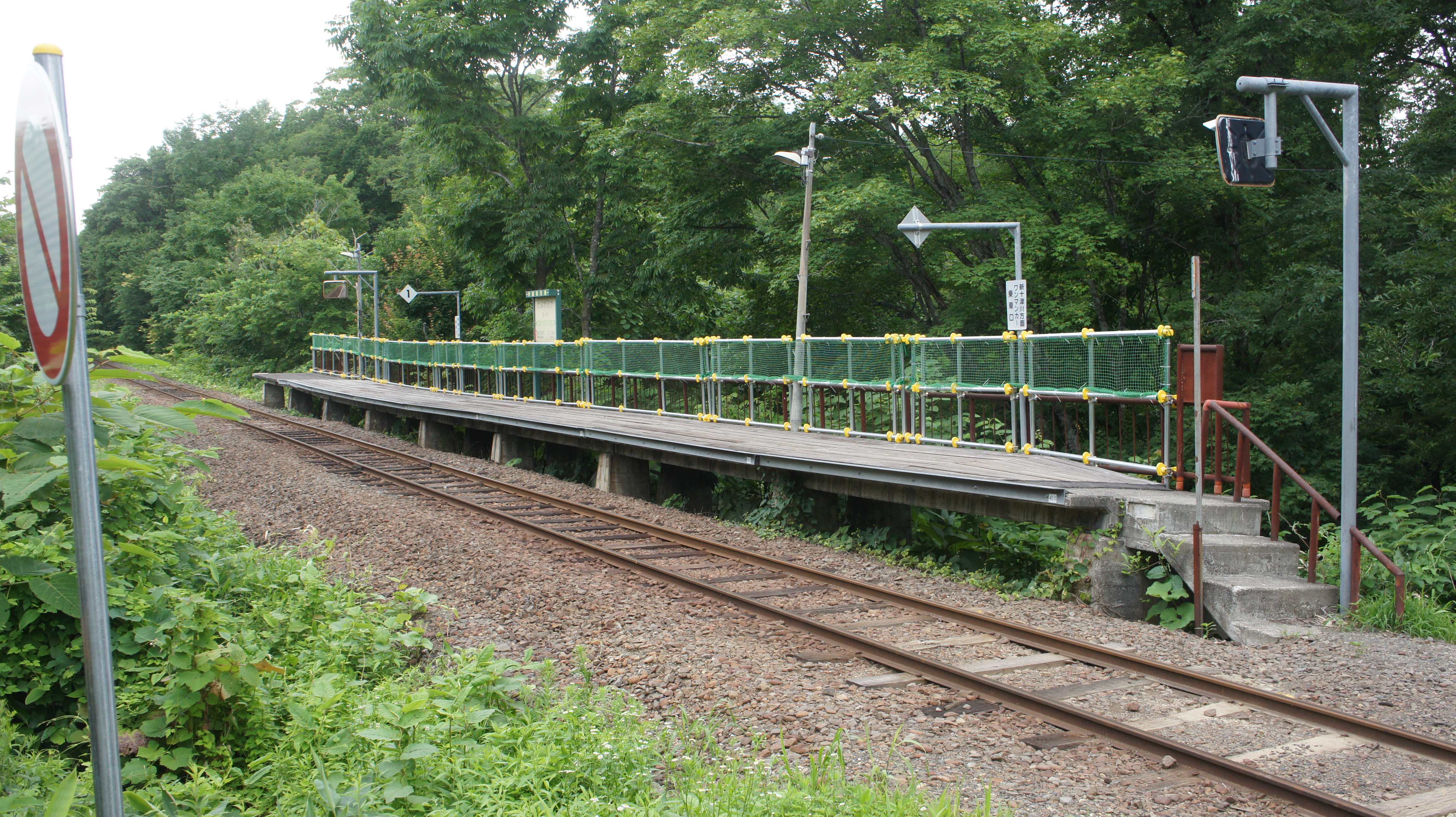 JR札沼線・豊ヶ岡駅のホーム